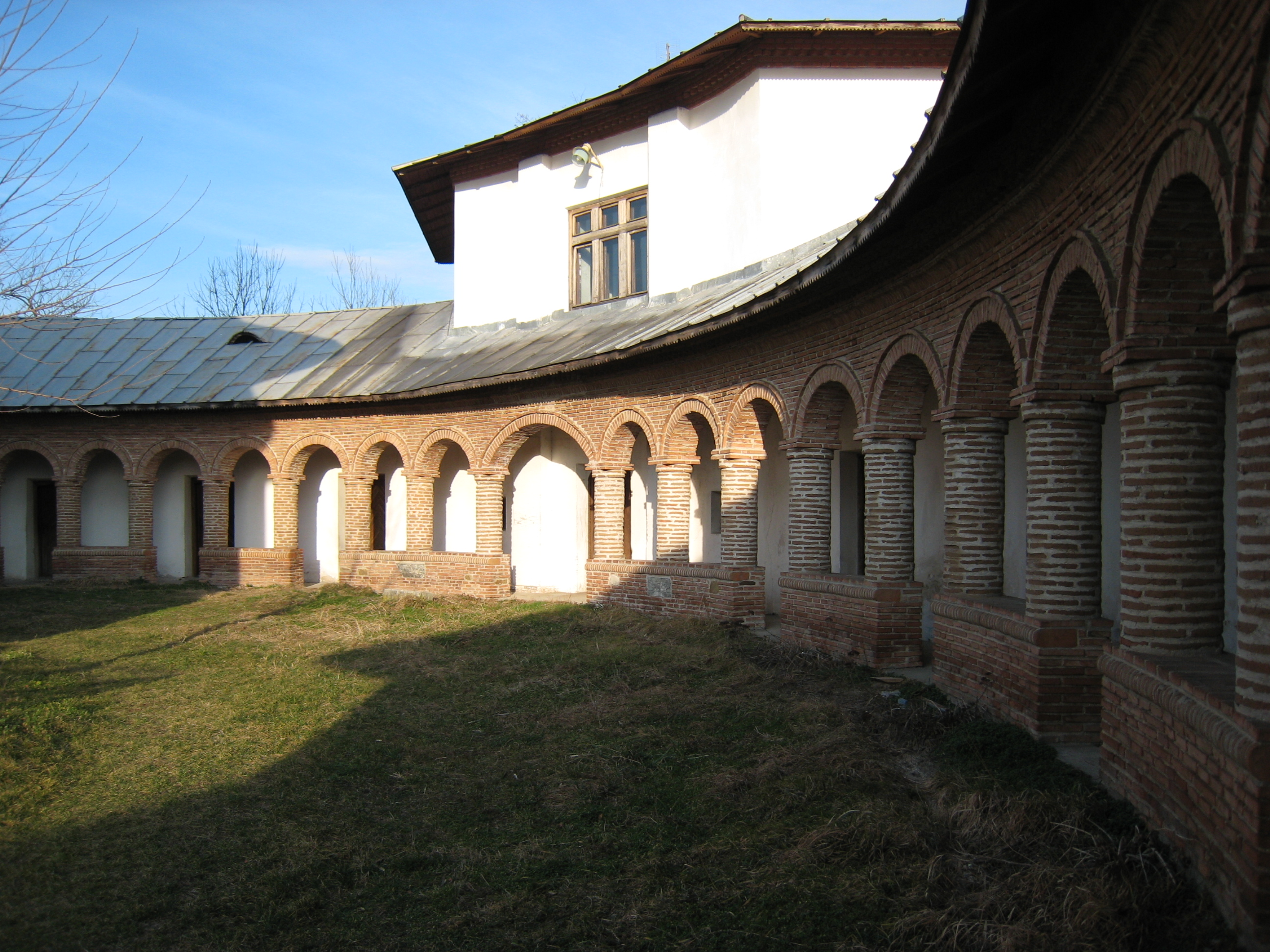 Manastirea Glavacioc - chiliile din partea de sud a bisericii - februarie 2007 04